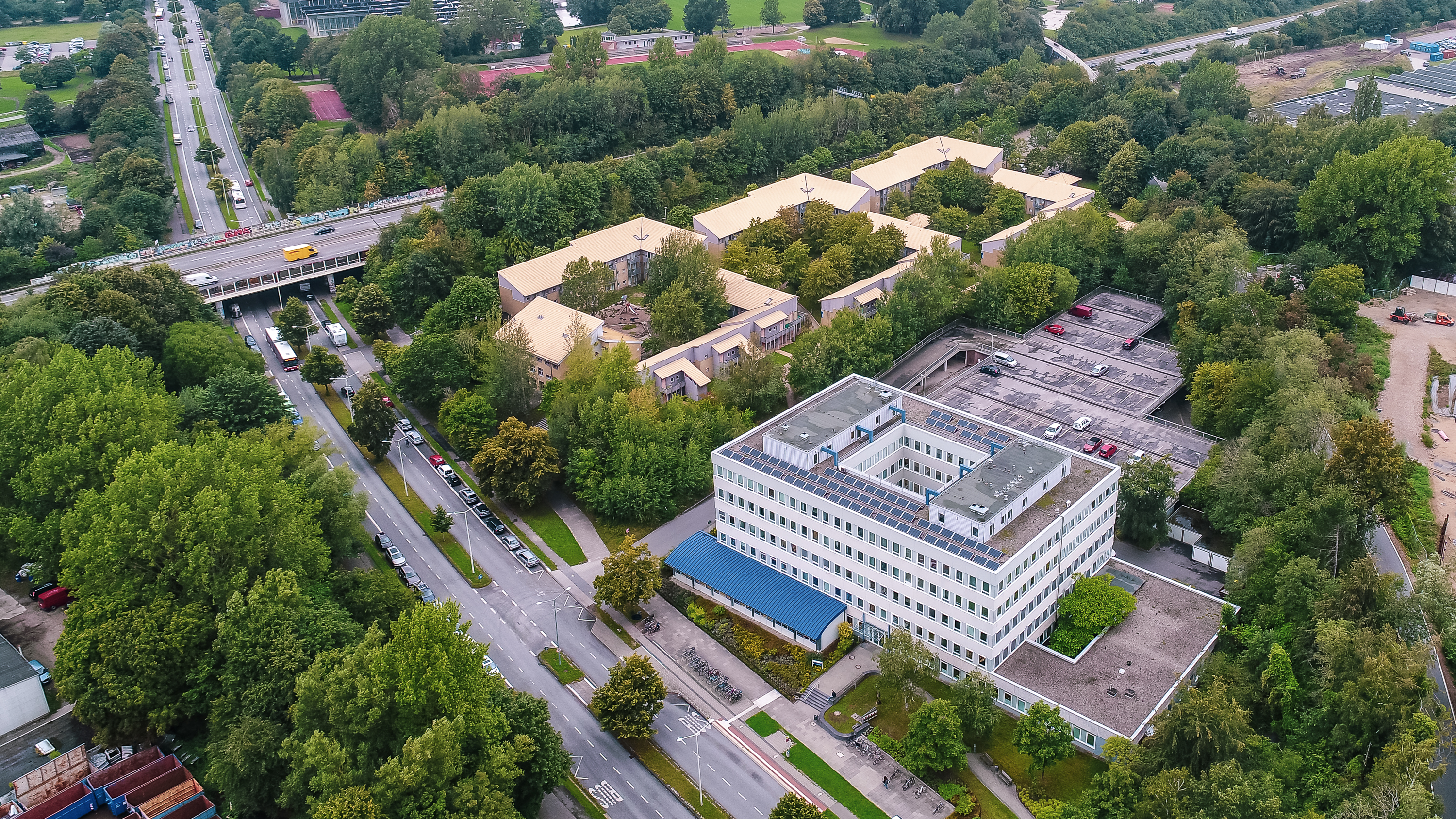 Das Leibniz-Institut für die Pädagogik der Naturwissenschaften und Mathematik an der Olshausenstraße, dahinter das Studentendorf (Studentenwohnheim auf dem Campus).